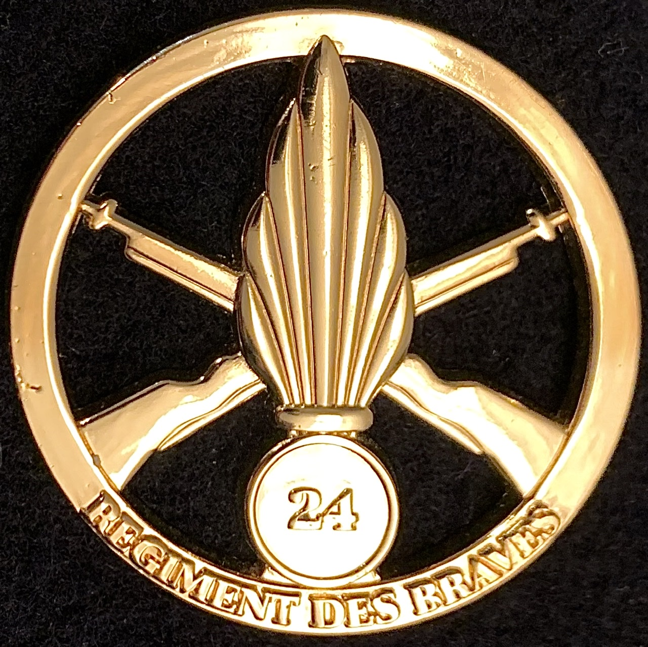 Insigne de béret 24 RI